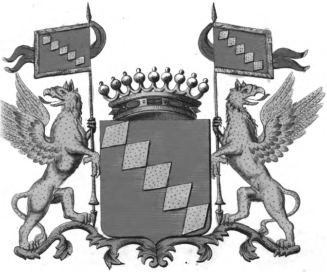 Armoiries de la famille de la Motte Baraffe